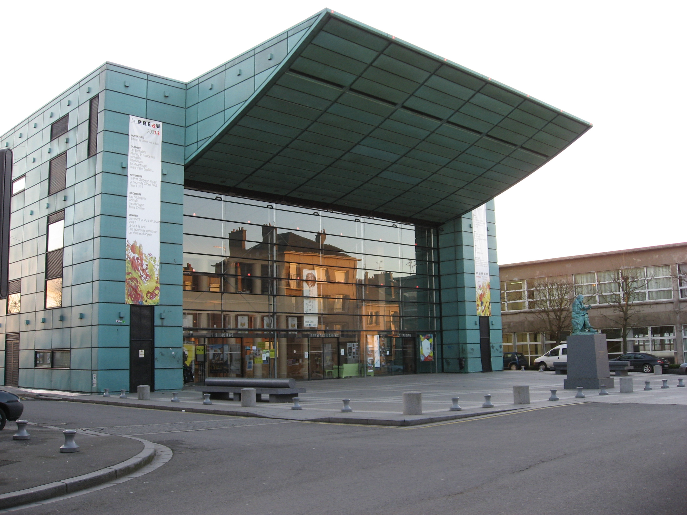 La place Castel à Vire avec la statue de René Castel (premier maire de Vire) et du théâtre/cinéma.